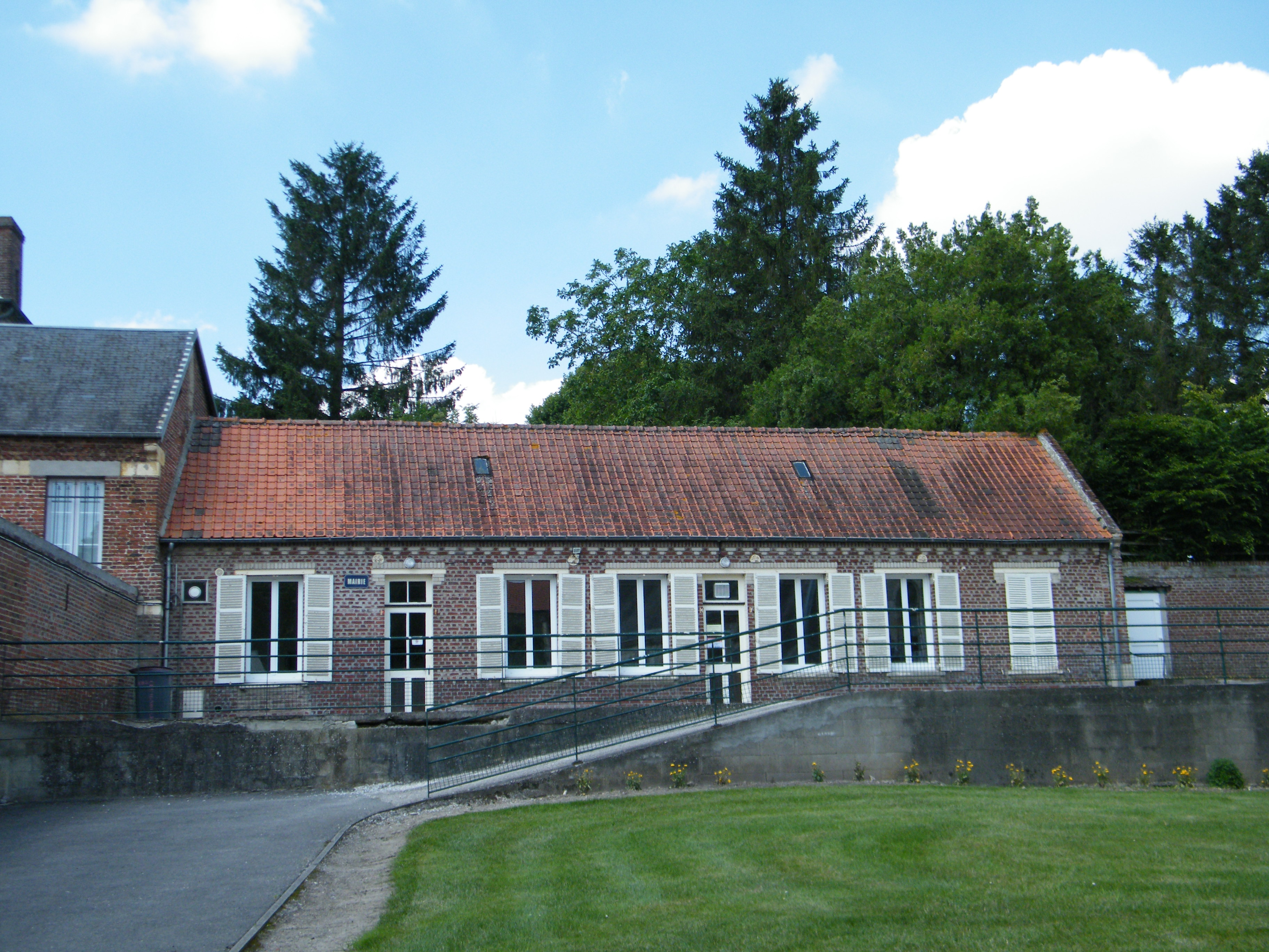 Mairie.